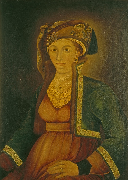 Портрет на Християния Зографска